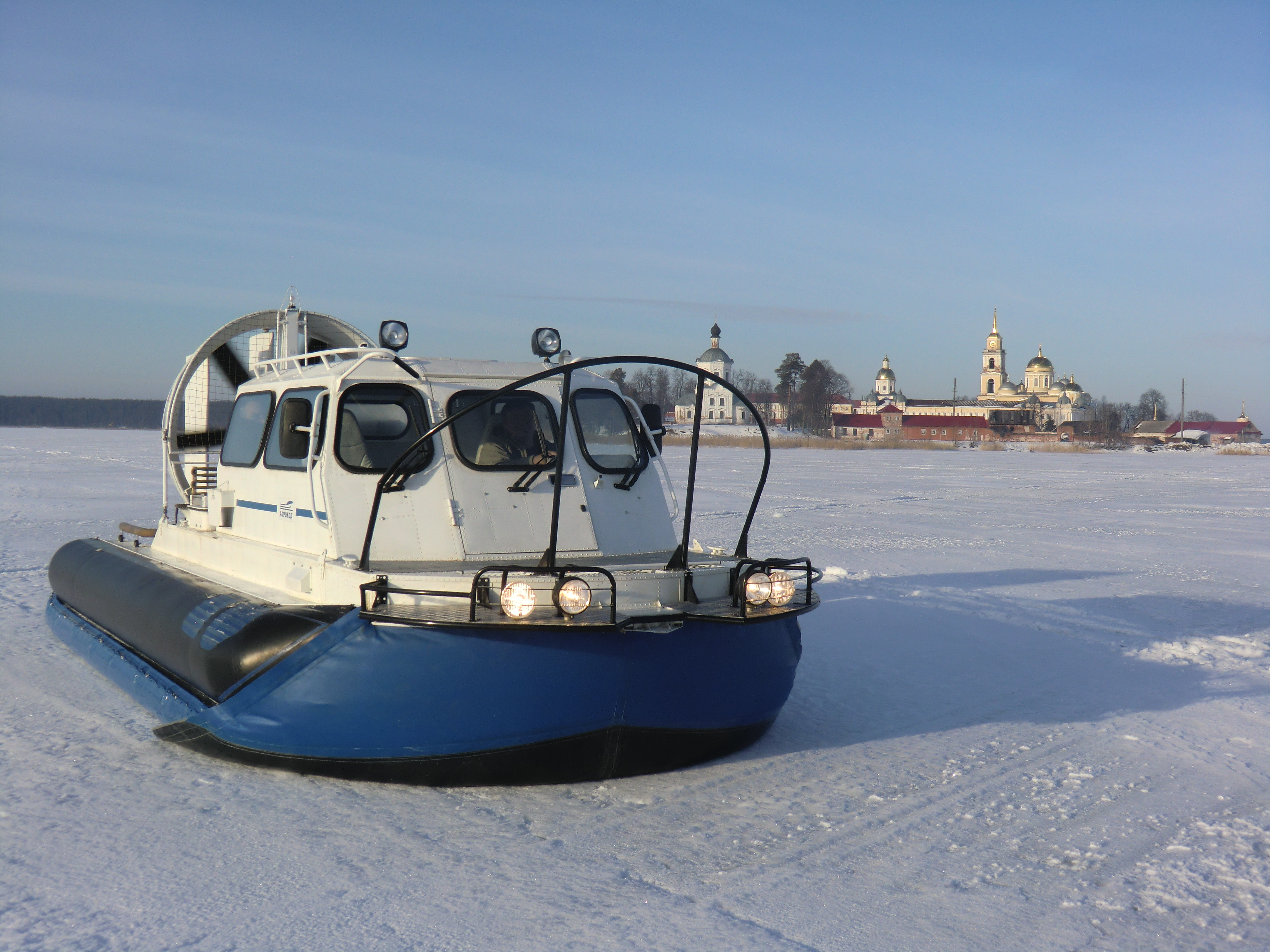 СВП Хивус-6 на озере Селигер в феврале 2015 г.